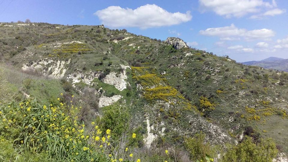 Τα πράσινα βουνά της θελέτρας